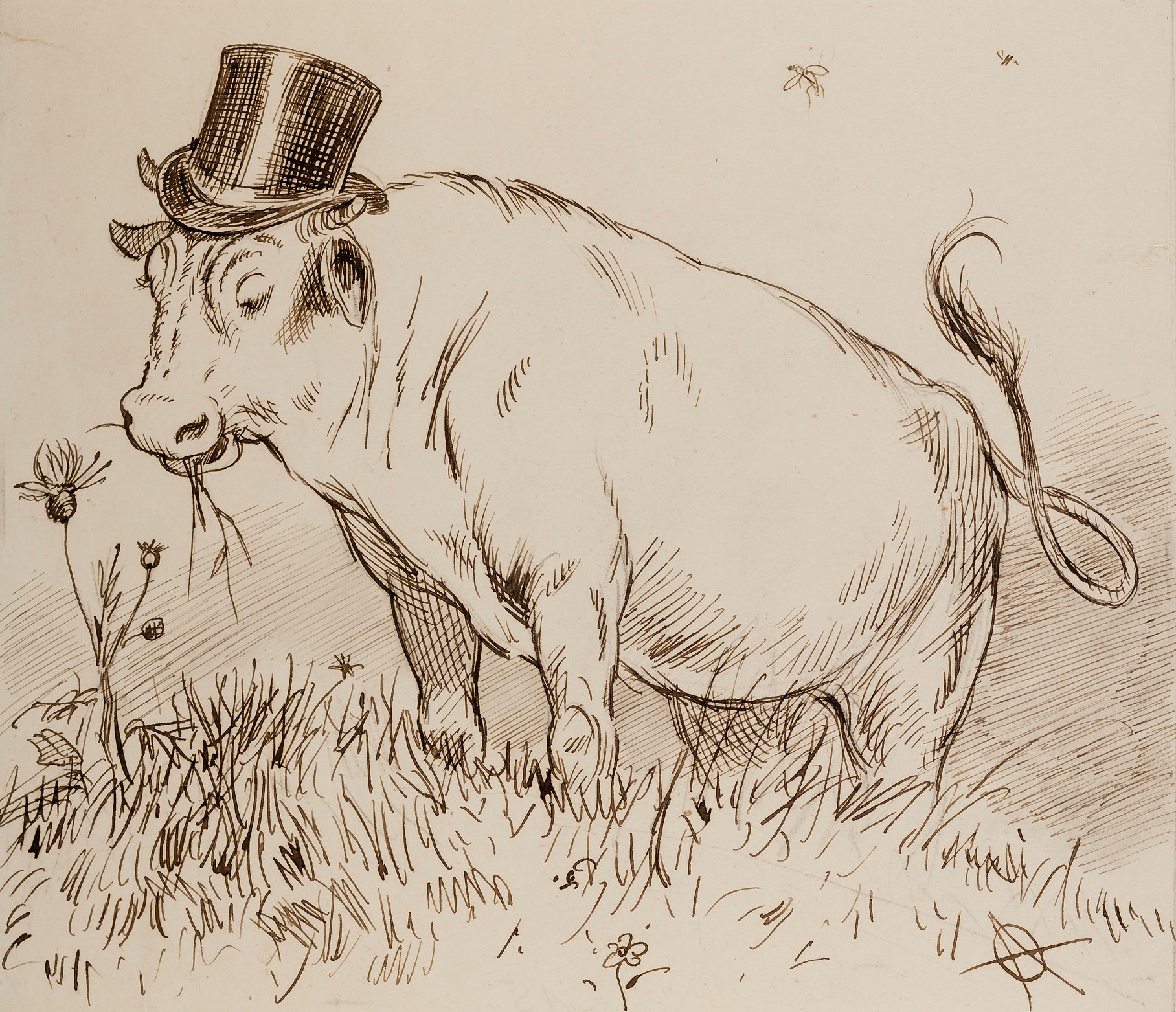 Adolf Oberländer: Der Ochse Feder in Tusche auf Papier 13 x 15,5 cm Rechts unten monogrammiert